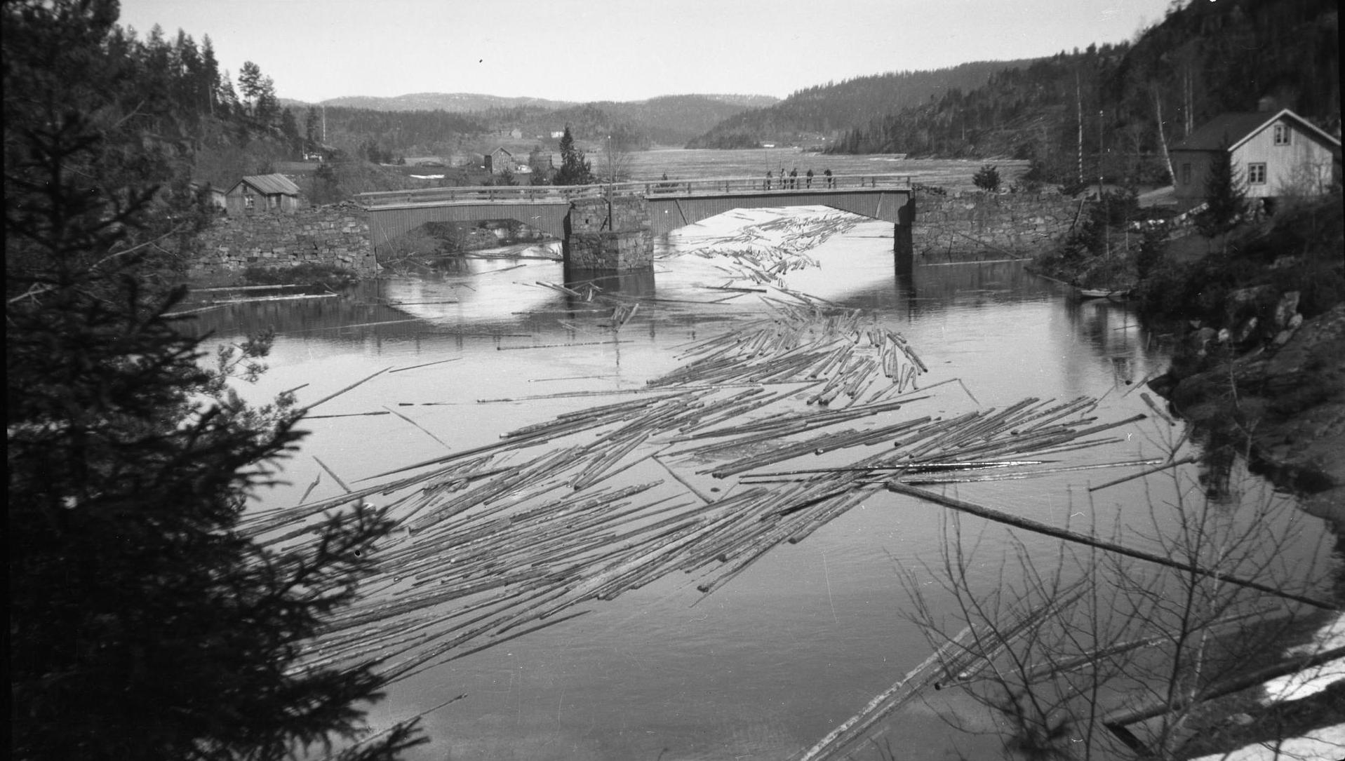 Fossbrua med tømmerfølting. Ca 200 meter nedenfor broen og Farsjø. Hydrologisk avdeling. Dato: 04.05.1917